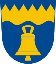 Týnišťko